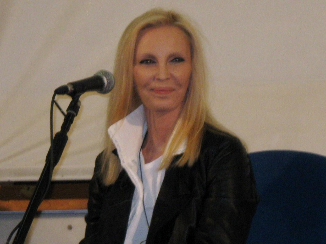 Roma - Università Studio 3 - Incontro con Patty Pravo per il "Comunicando" inserito poi nel nuovo dvd creato interamente dai fan "Circola Un Video Su Di Me", pubblicato poi a fine Dicembre 2009.